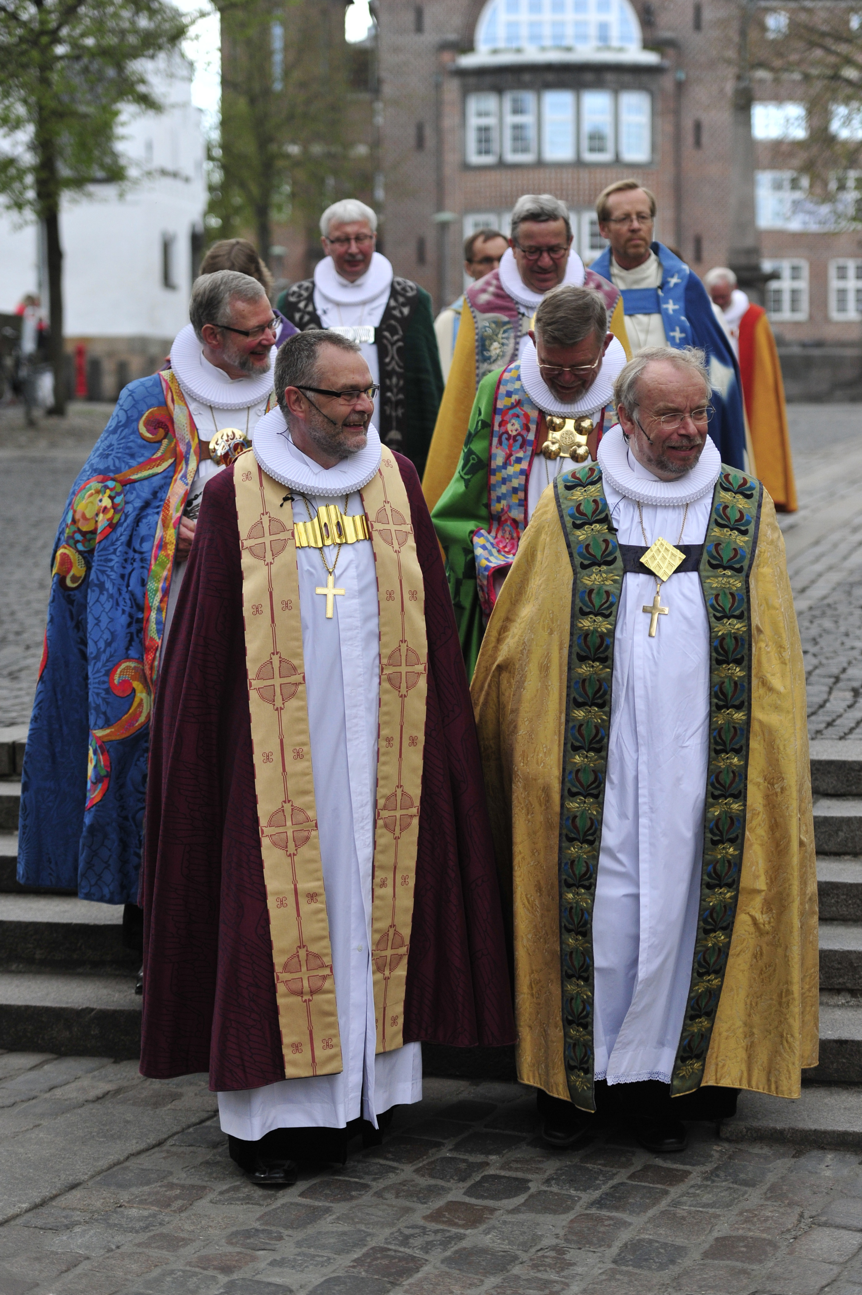 Biskop Henning Toft Bro (tv) og biskop Peter Skov-Jakobsen (th) fører processionen af biskopper og provster ud af Budolfi Kirke efter bispevielse af Toft Bro.